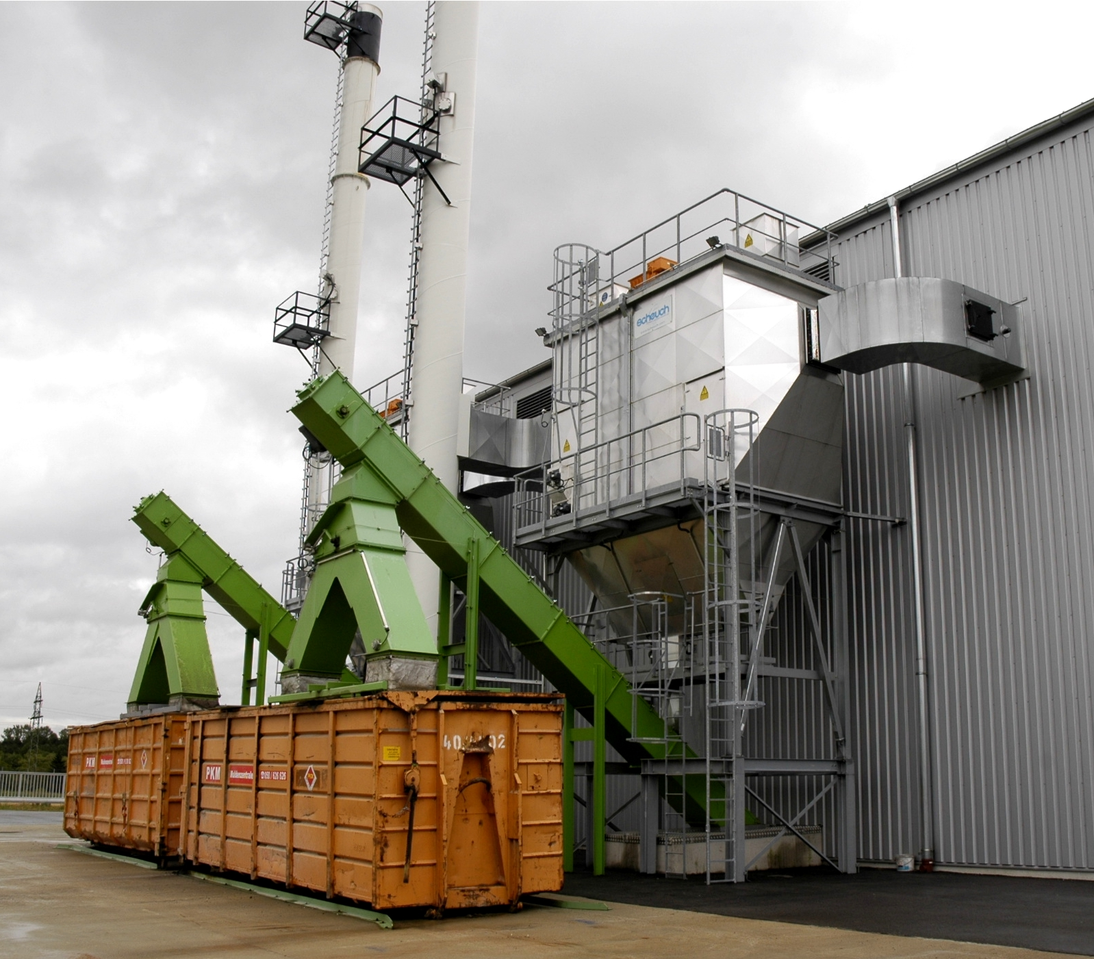 Elektrofilter des Biomasseheizwerkes Mittleres Schwarzatal der EVN Wärme, welches die Städte Ternitz und Neunkirchen mit Fernwärme versorgt.